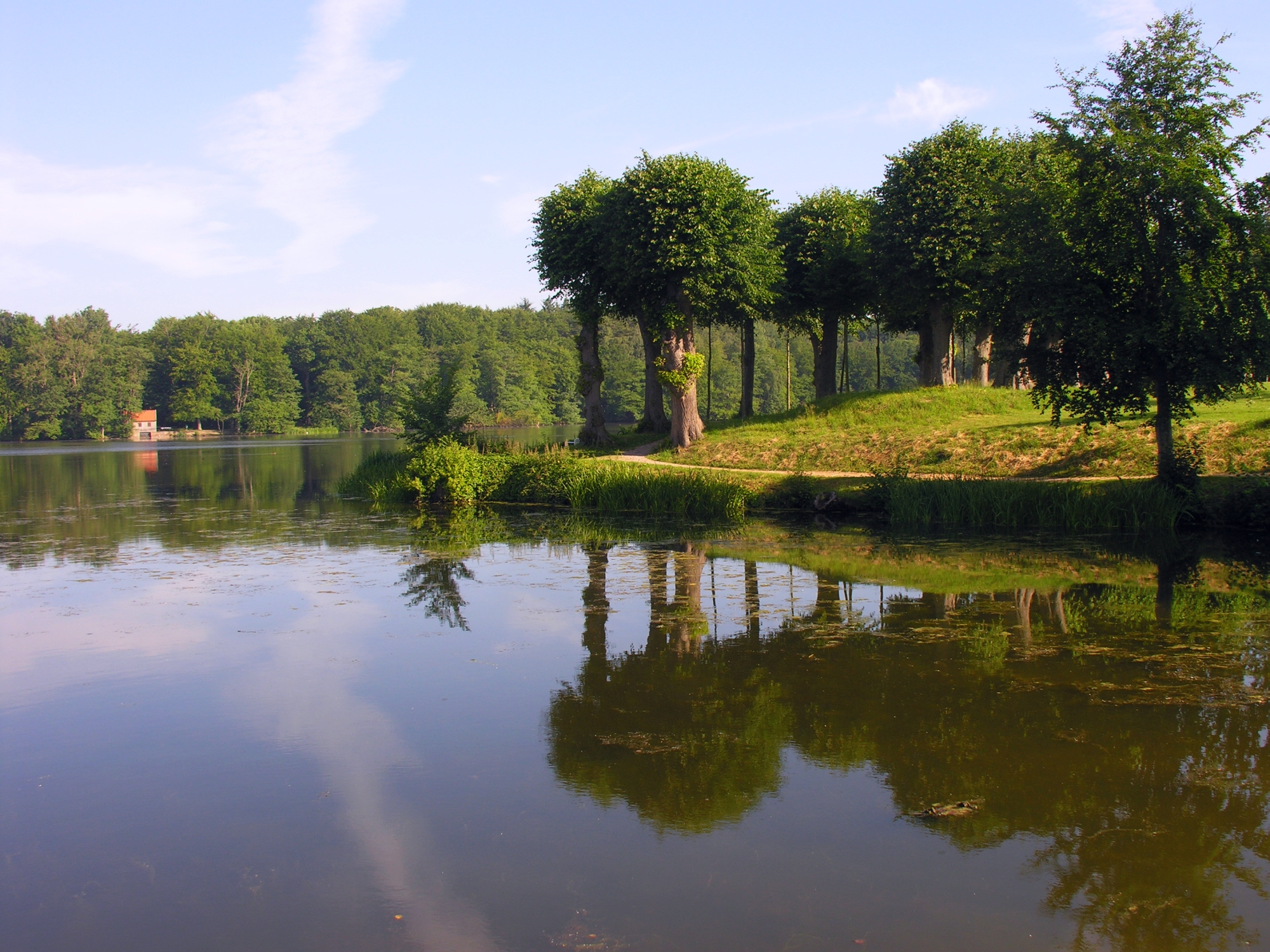 Kulturdenkmal 4.21 Schlossteichufer am Schloss Glücksburg Schleswig-Holstein Foto 2012 Wolfgang Pehlemann Steinberg/Ostsee DSCN0222